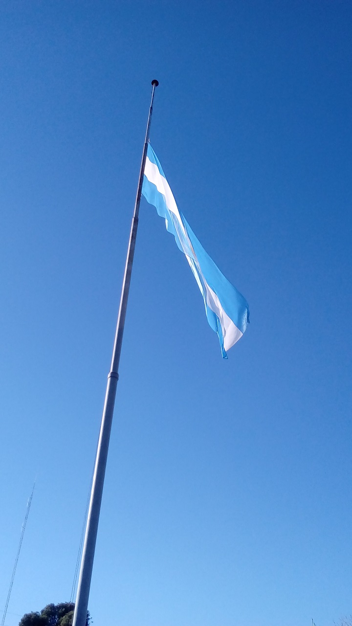 Foto tomada una mañana en la localidad de Choele Choel, Rio Negro, donde estudiantes de cuarto grado de primaria, juraban la bandera.